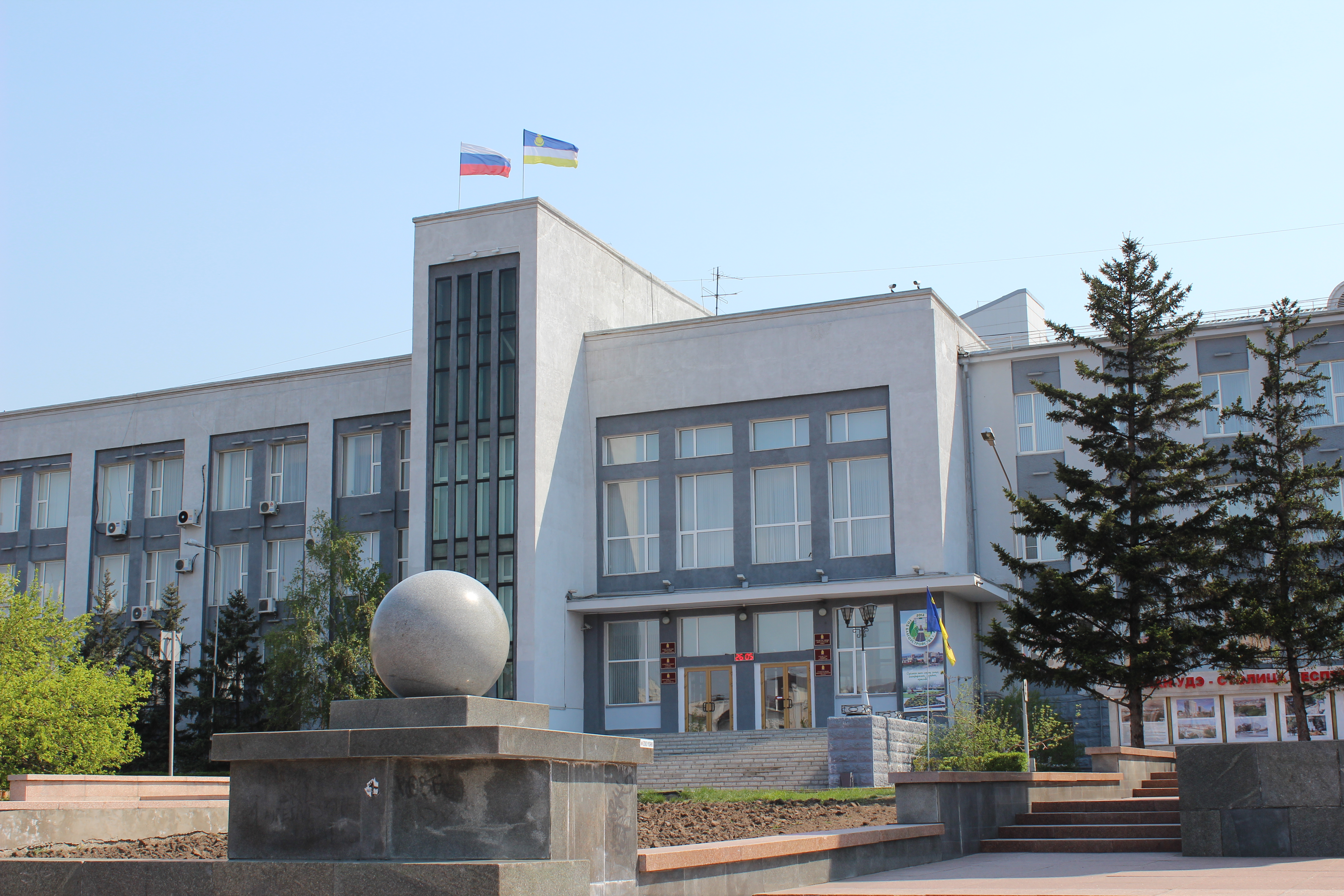 Здание администрации города Улан-Удэ, площадь Советов.